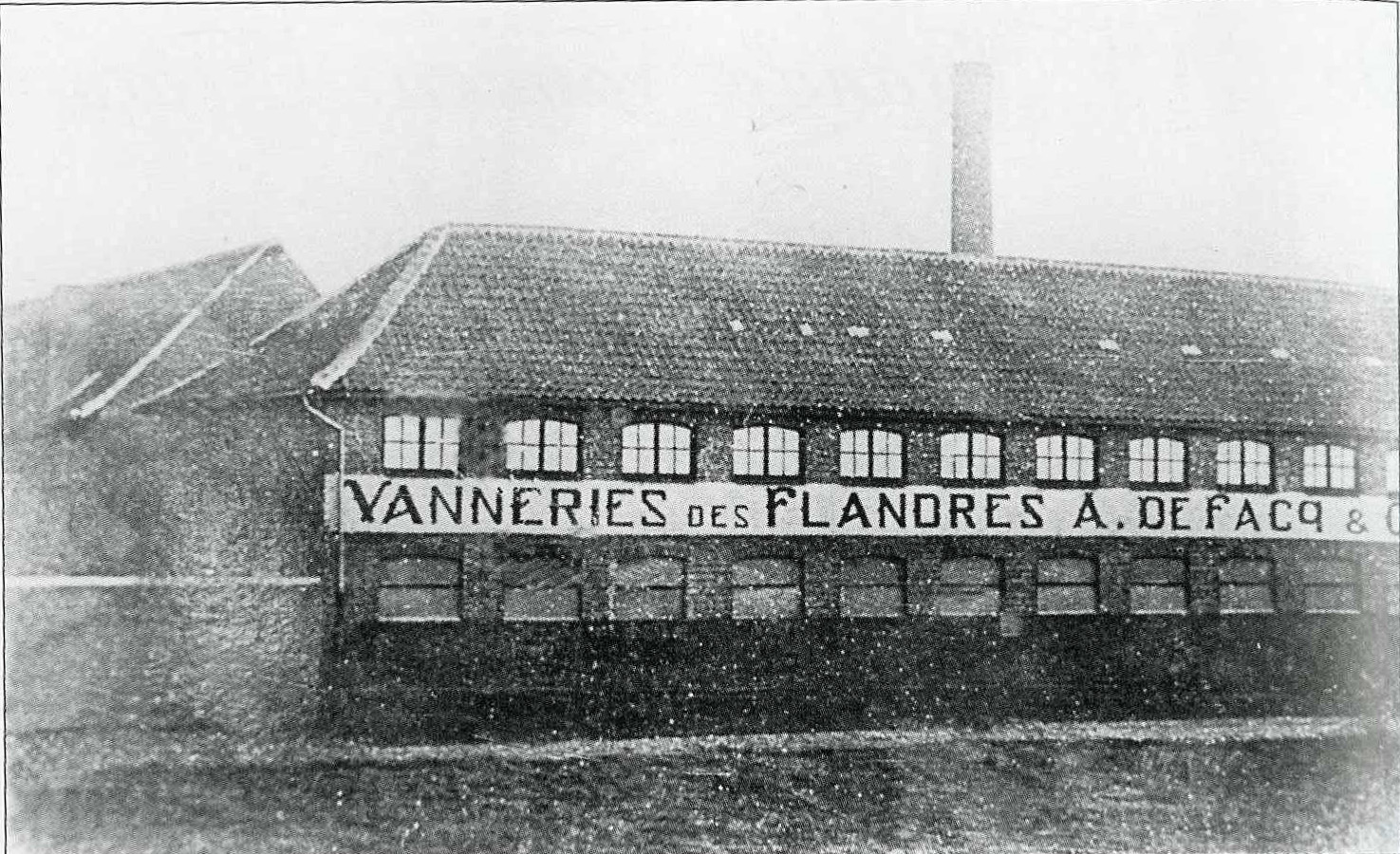 Rietmeubelfabriek in Maldegem - Oost-Vlaanderen - Vlaanderen - België